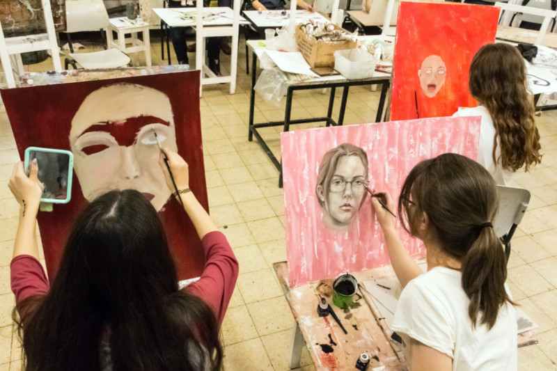 מגמת אמנות פלסטית – תיכון עירוני א' לאמנויות